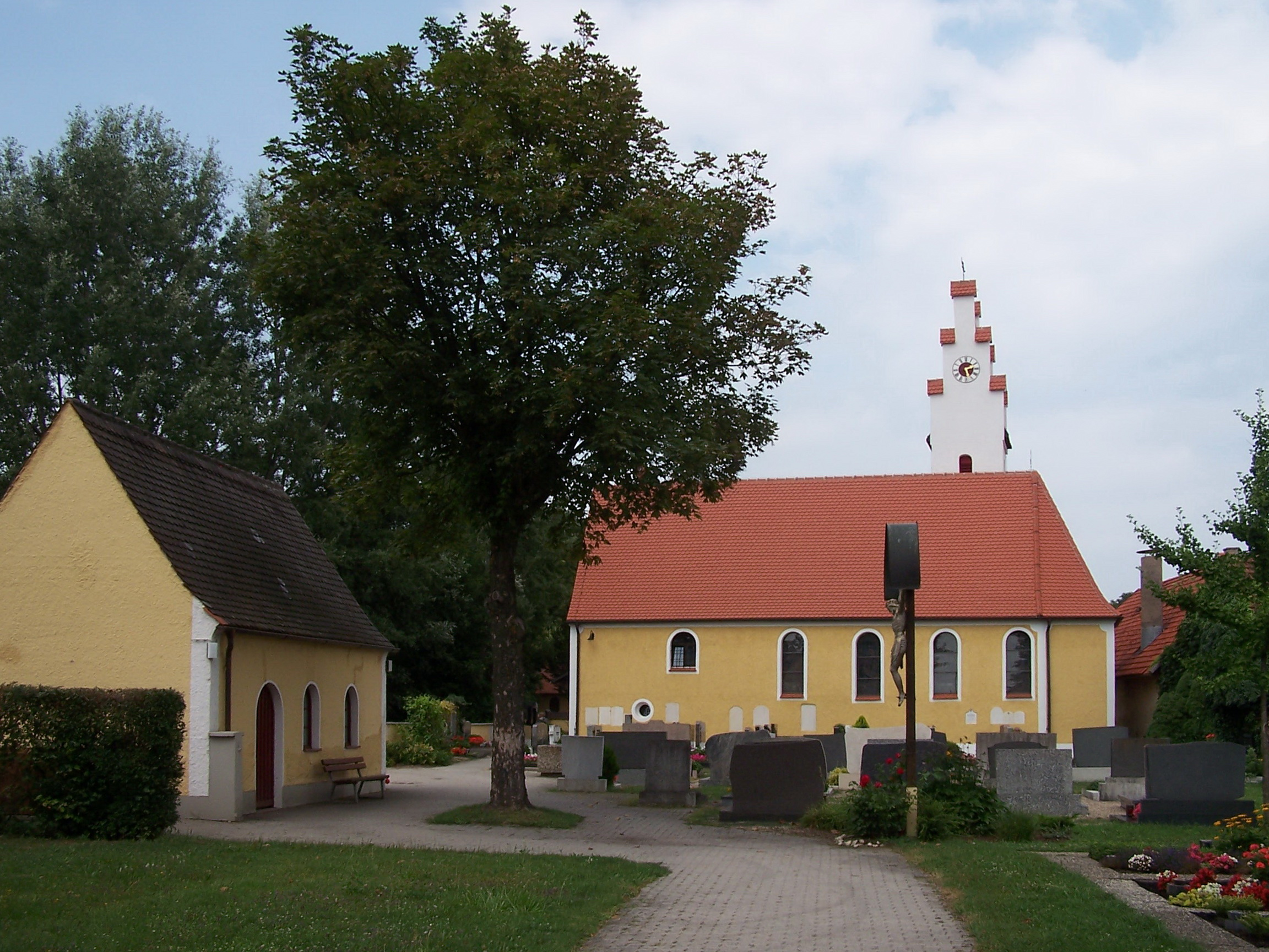 Obertraubling, Niedertaubling, Schloßstraße 6. Katholische Filialkirche St. Peter, Saalbau mit abgewalmtem Satteldach und Flankenturm mit Treppengiebel, im Kern 12. Jahrhundert, Chor spätgotisch, Umbau bez. 1533.